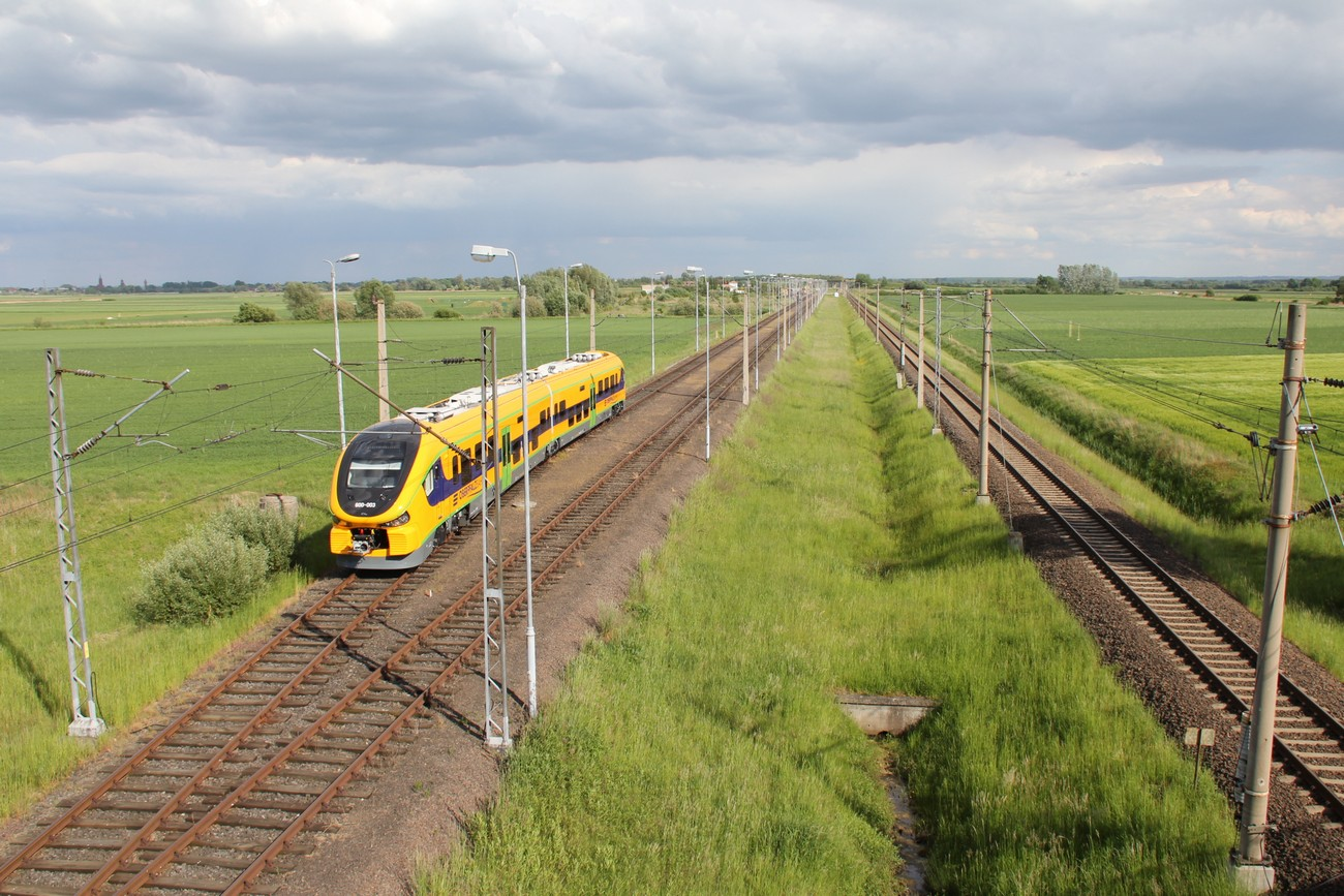 Trwają testy jednostki 600 003